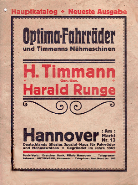 Titel vom 1913 erschienenen „Hauptkatalog - Neueste Ausgabe Optima-Fahrräder und Timmans Nähmaschinen H. Timman Gen. Bev. Harald Runge Hannover - Am Markte 13 ...“ Das Gebäude war durch seinen ehemaligen Eigentümer, den Frühkapitalisten, Kaufmann, Oberbergfaktor, Bauunternehmer, Ratsherrn und Senator Johann Duve, der das repräsentative Haus vor der Marktkirche zwischen Bohlendamm und Kramerstraße ab 1656 bewohnte, auch als Duve-Haus bekannt. H. Timmann bewarb mit seinem Katalog sein noch zur Zeit des Königreichs Hannover gegründetes Unternehmen als „Deutschlands ältestes Spezial-Haus für Fahrräder und Nähmaschinen ...“ ...